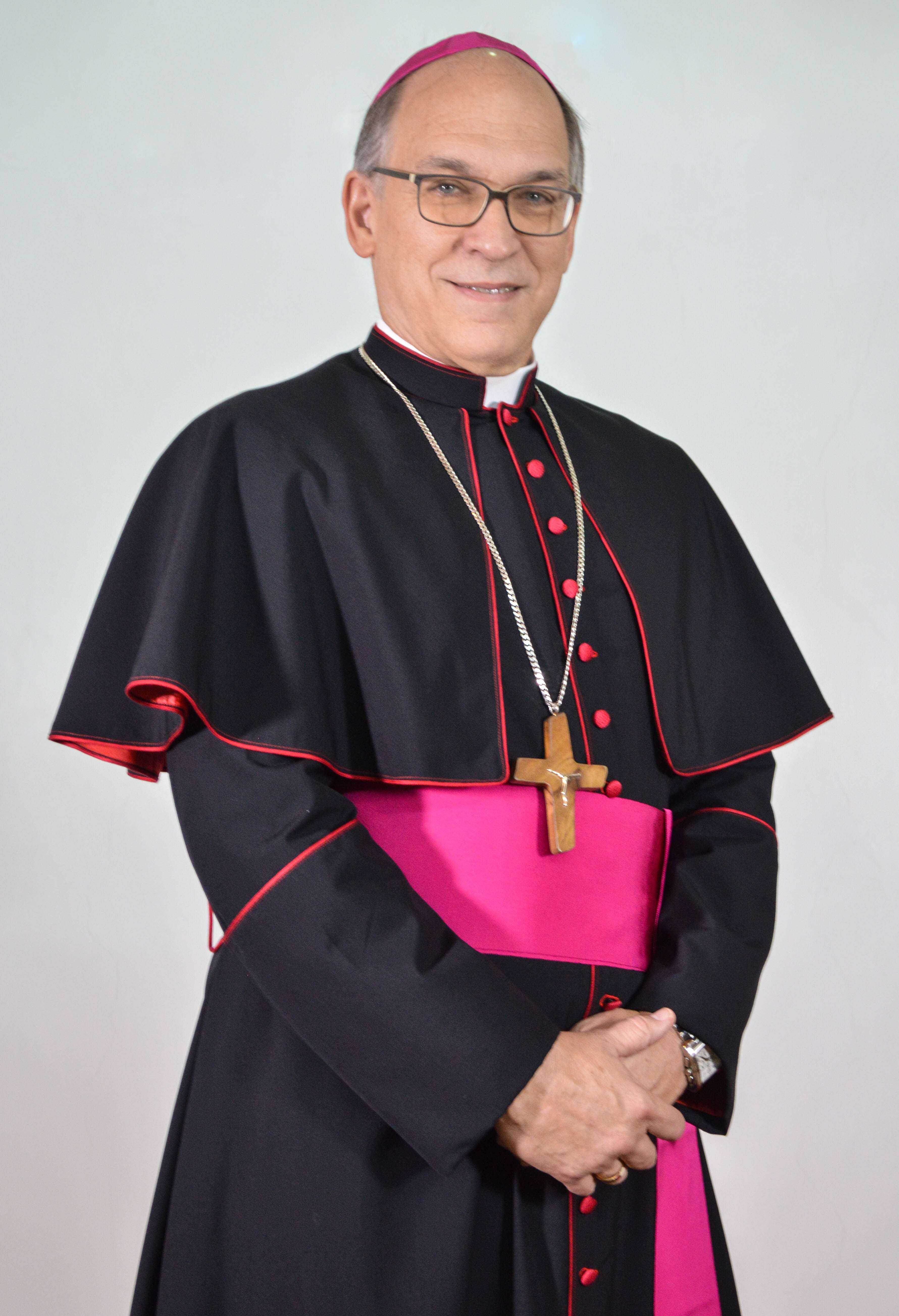 Foto 2018. Obispo de Baní.